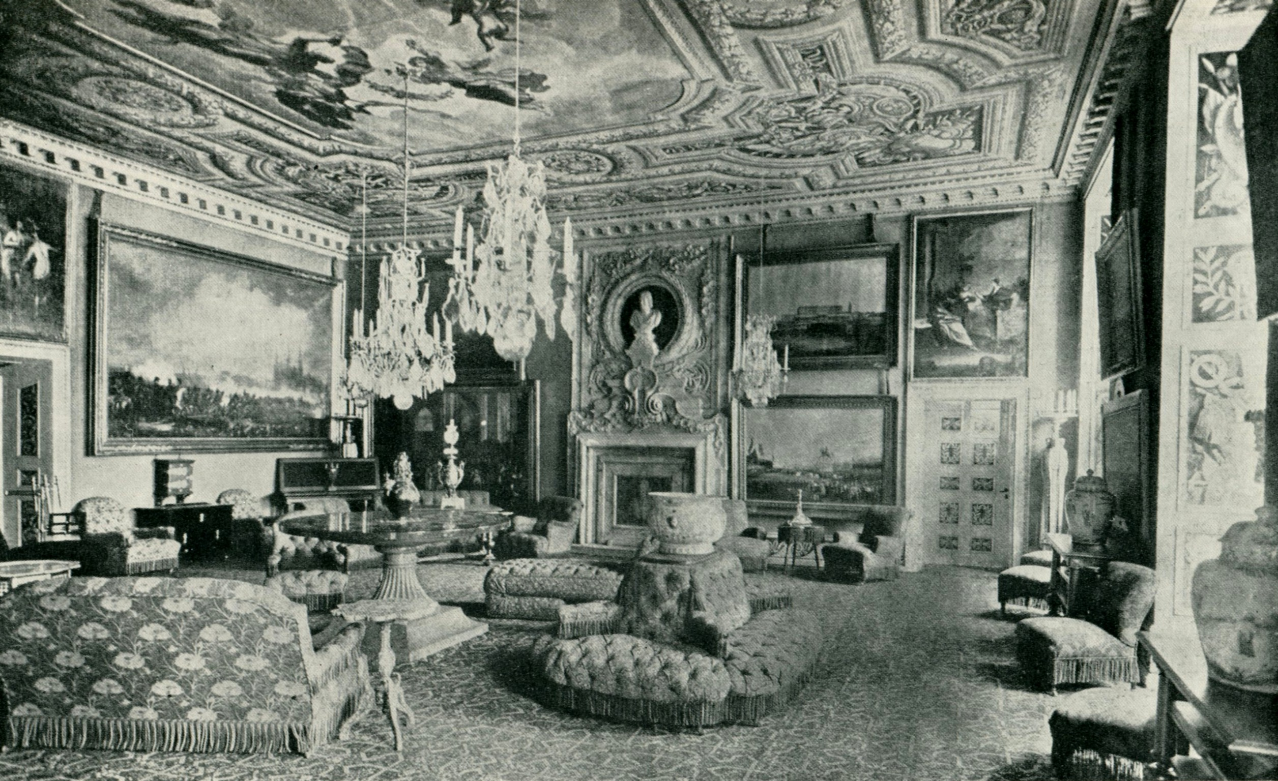 Stensalen på Drottningholms slott under Oskar II:s tid